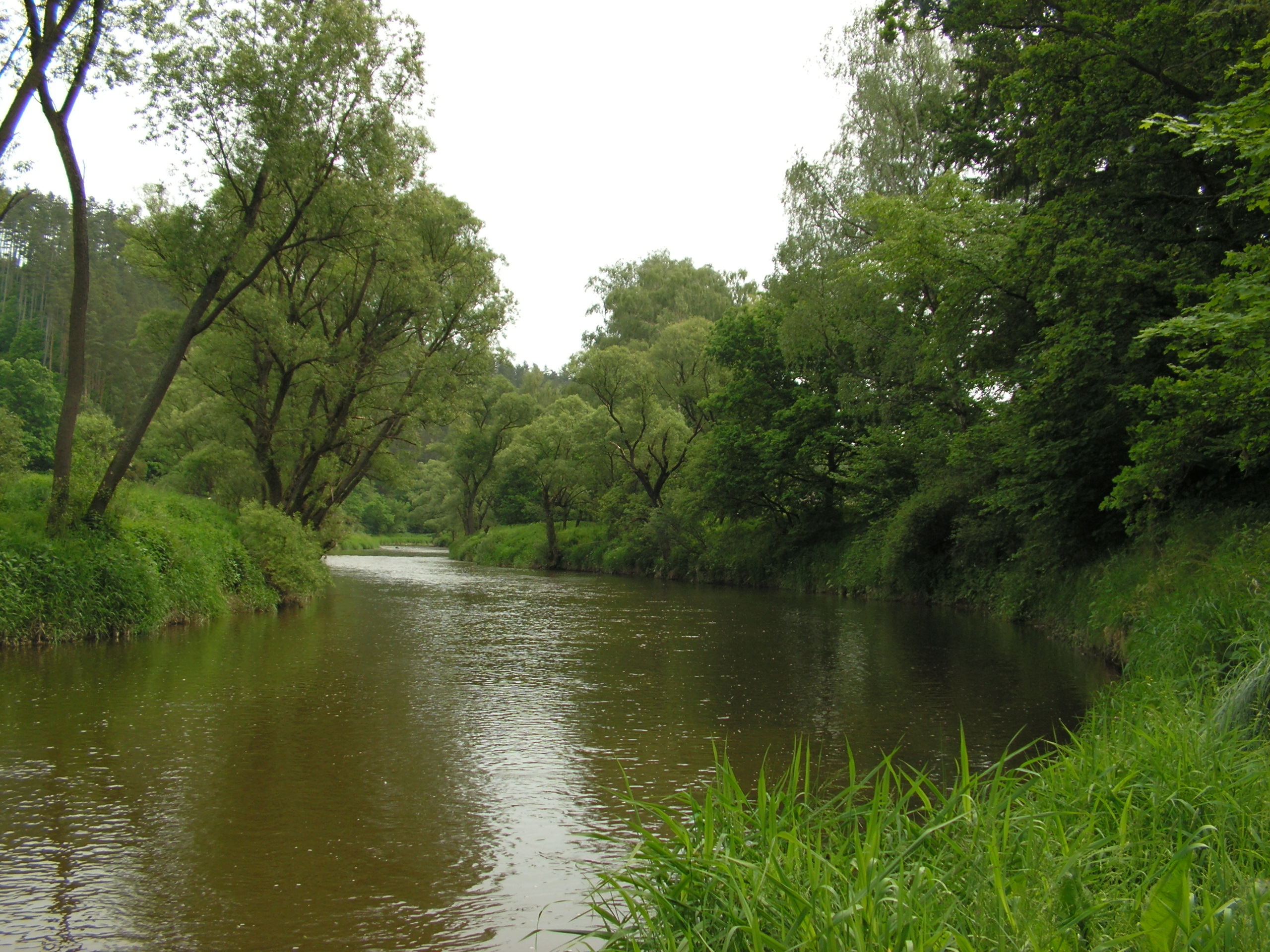 Pohled na Sázavu nad soutokem se Želivkou.